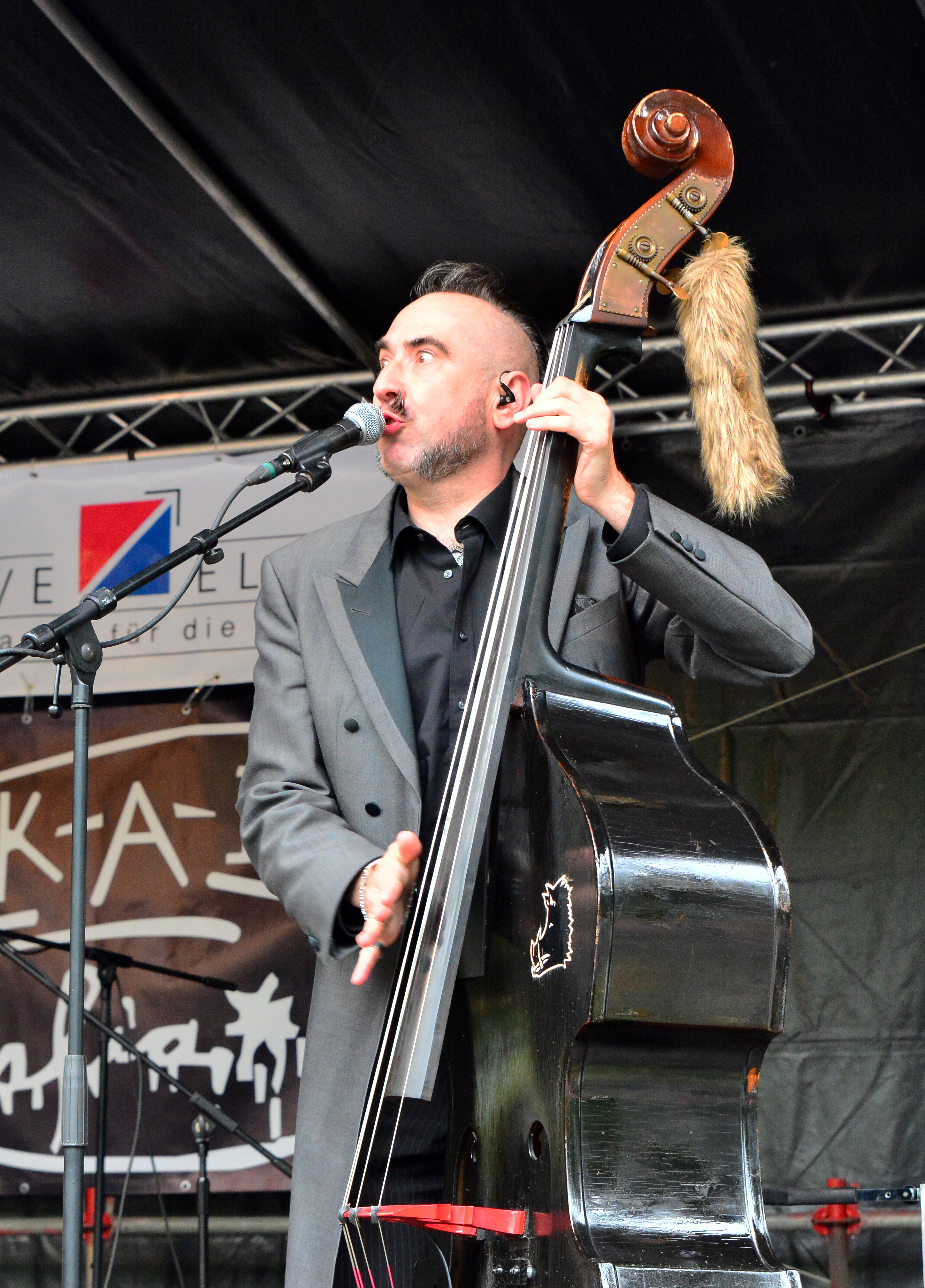 Rockabilly Mafia beim „Jazz 'n Roses 2015“ im Liether Rosengarten Elmshorn